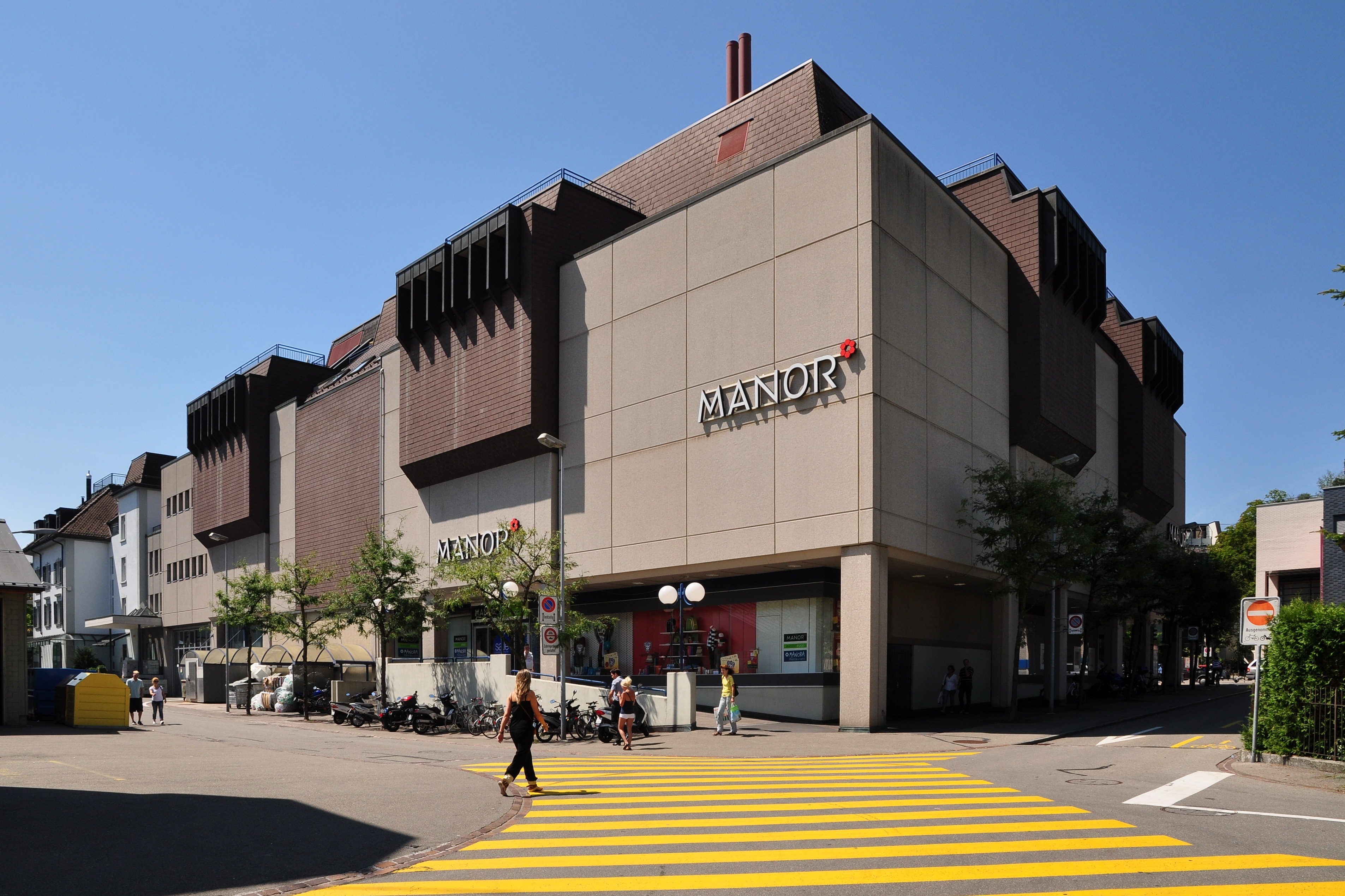 Manor shopping mall at Merkurstrasse / Tiefenaustrasse in Rapperswil (Switzerland)